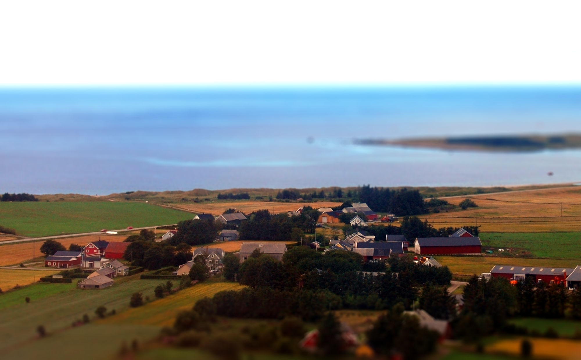 Nordhassel. Lista.